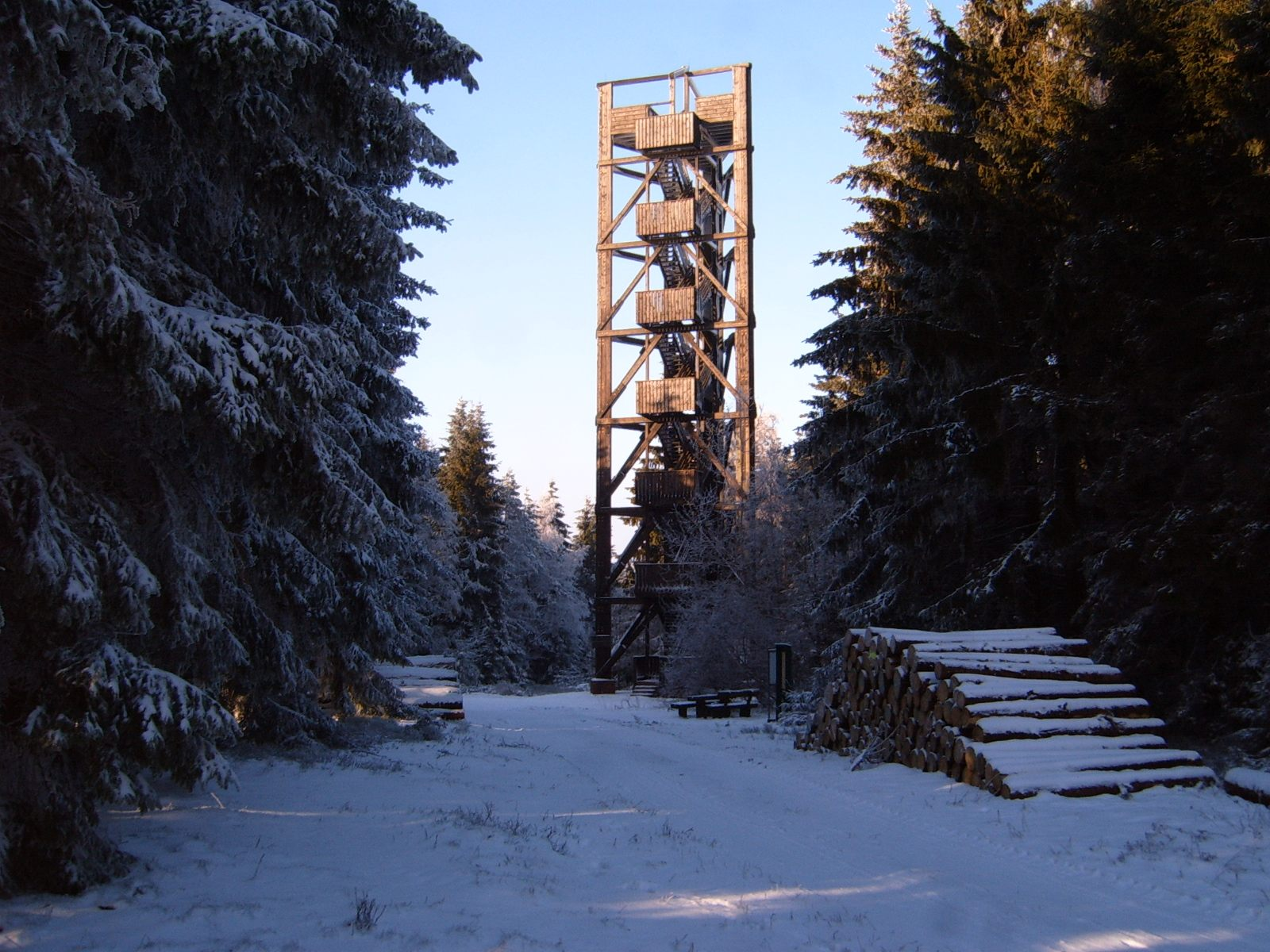 Aussichtsturm Idarkopf